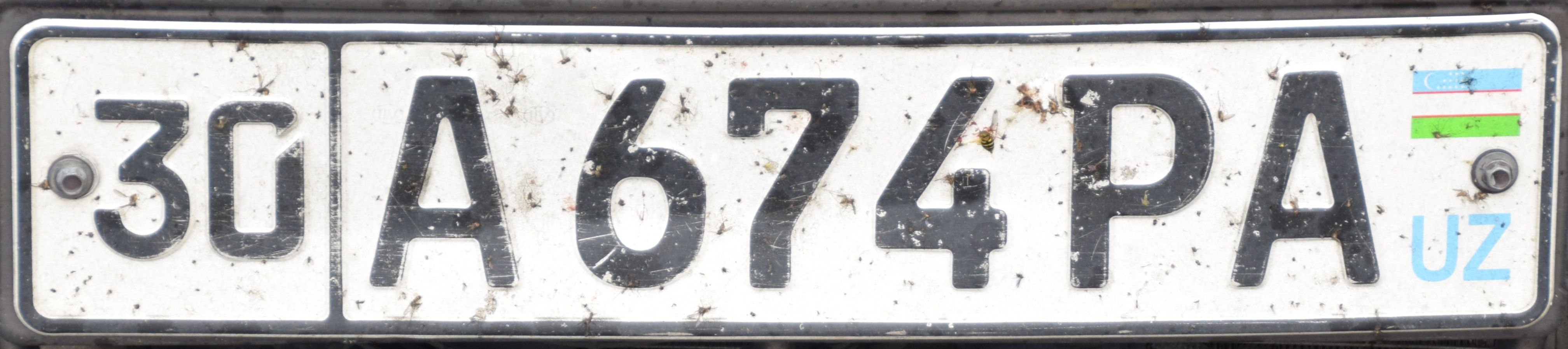 kentekenplaat uit Oezbekistan